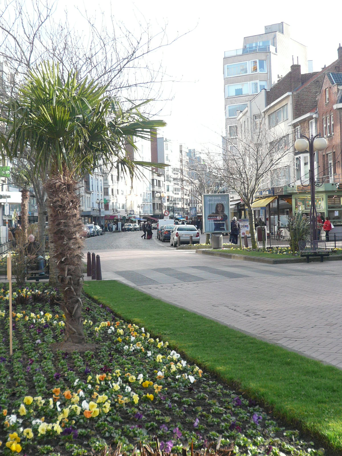 Centre-ville De Panne